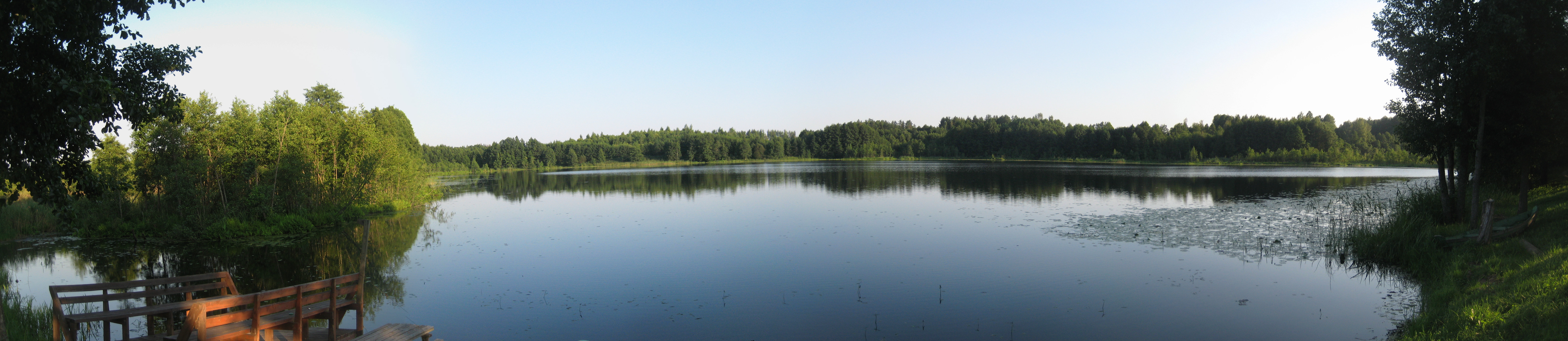 Antazavės sen., Lithuania